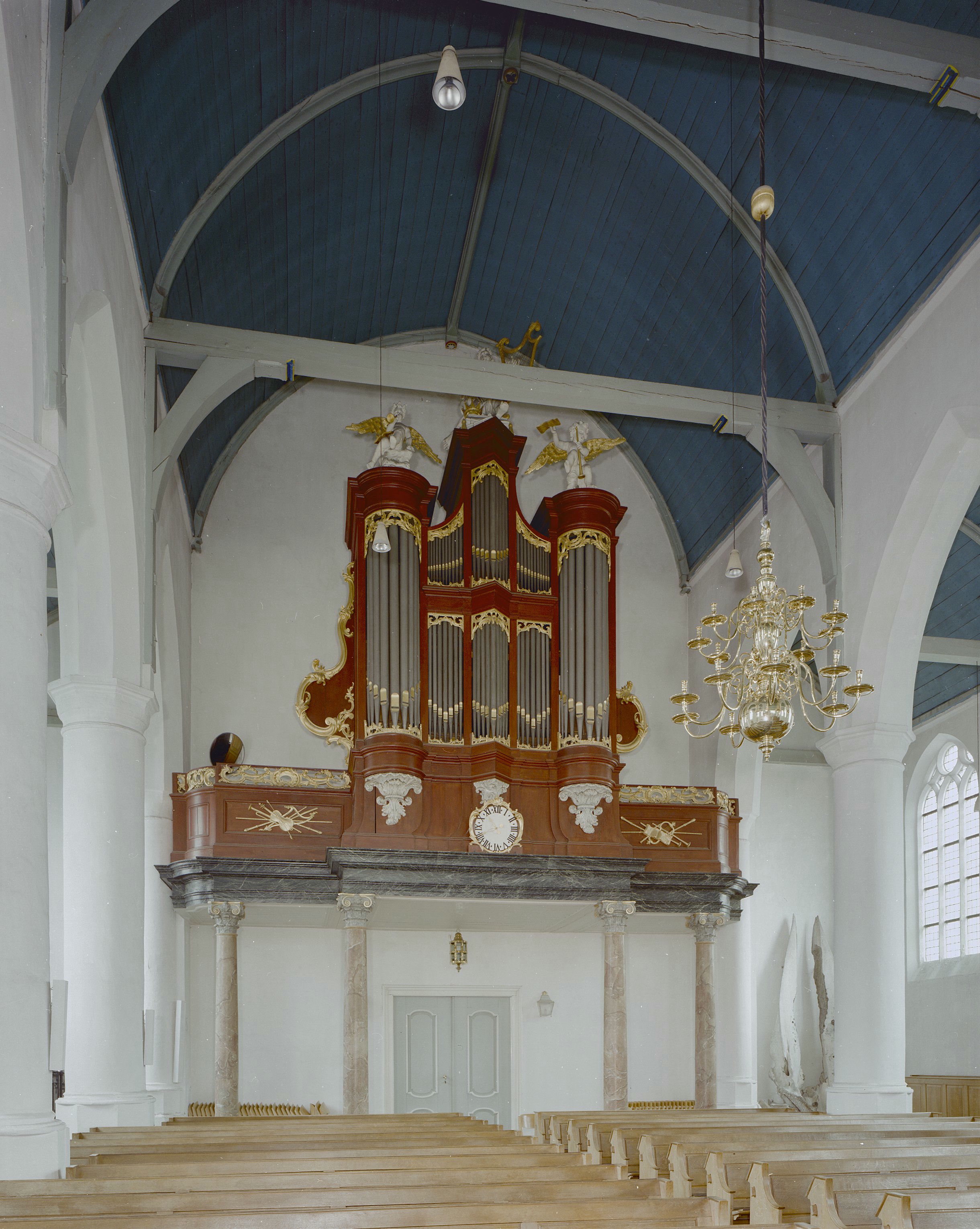 Hervormde Oude kerk: Interieur, aanzicht orgel, orgelnummer 1336 (opmerking: Gefotografeerd voor Het Historische Orgel in Nederland 1726-1769, bladzijder 336)